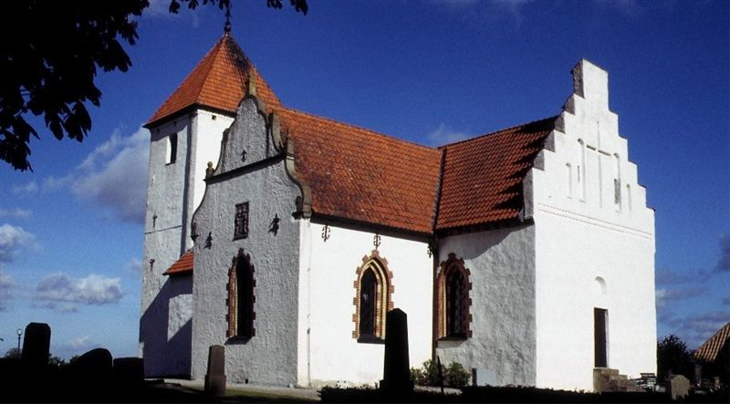 Bara kyrka i Skåne, Sverige. Bara kirke